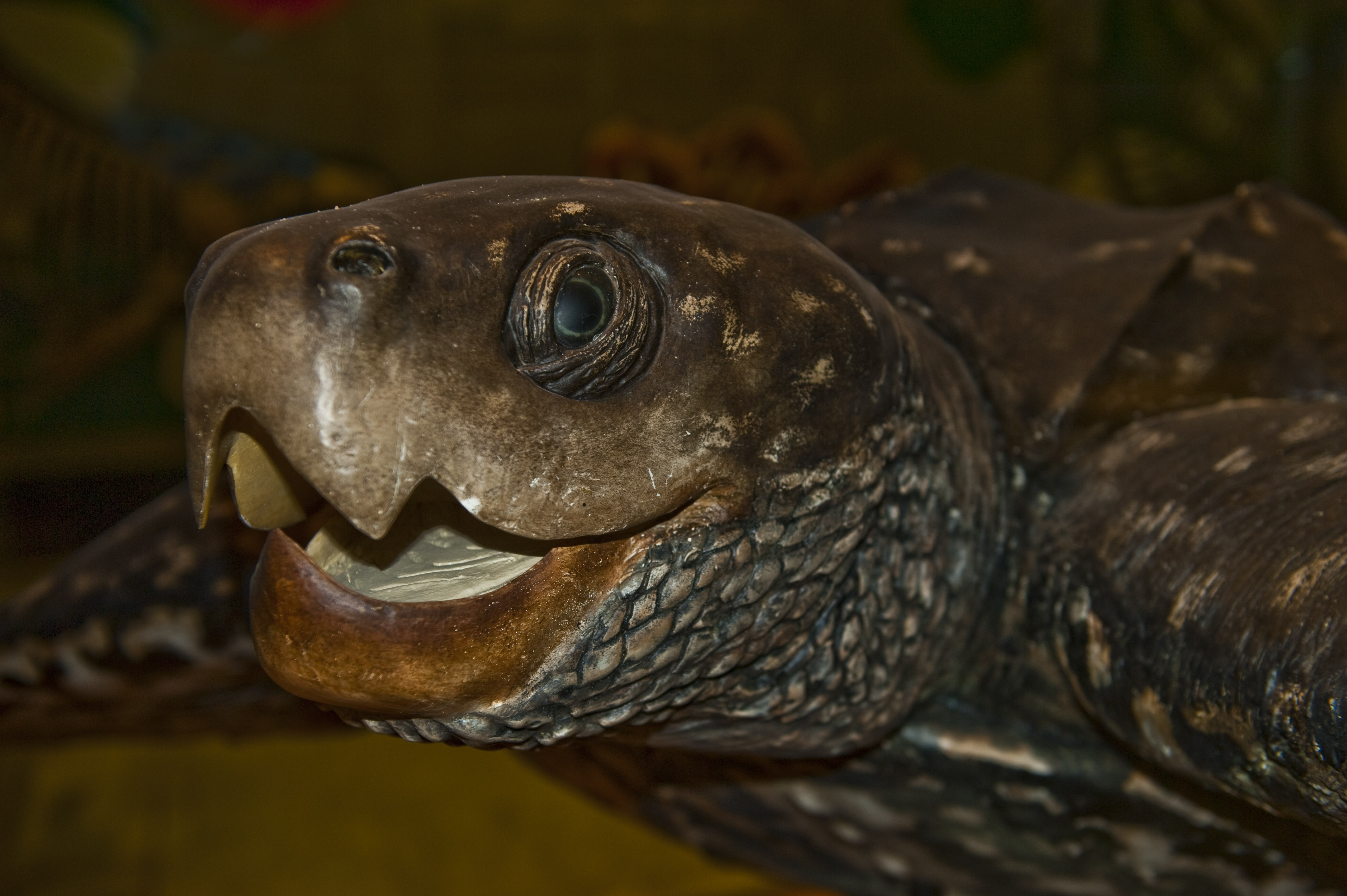 Dermochelys coriacea (de: Lederschildkröte (Senckenberg Naturmuseum, Frankfurt, Germany)